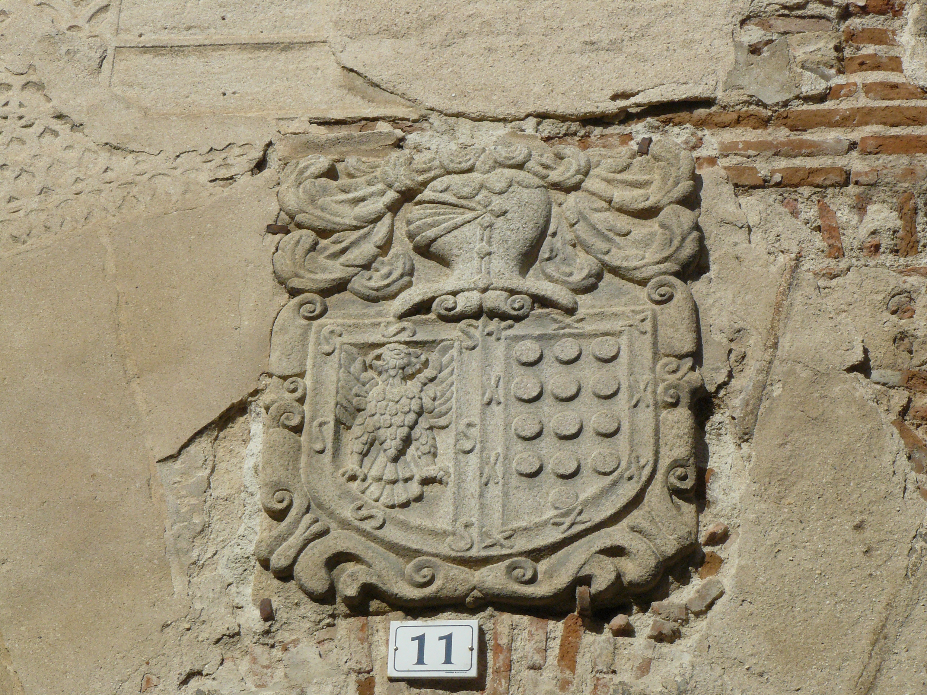 Palacio de los Sedeños, Arévalo, provincia de Ávila.